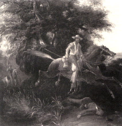 Mexican Guerrilla